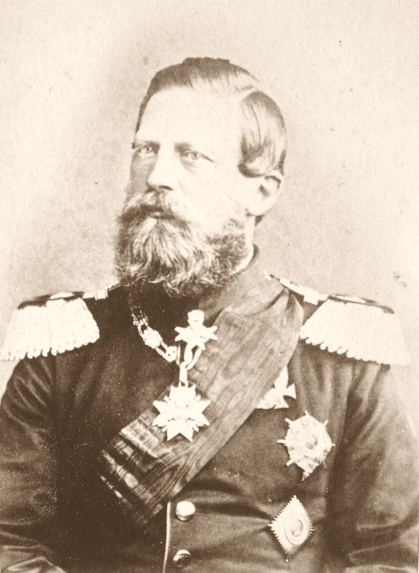 Kronprinz Friedrich Wilhelm von Preußen, späterer Kaiser Friedrich III.